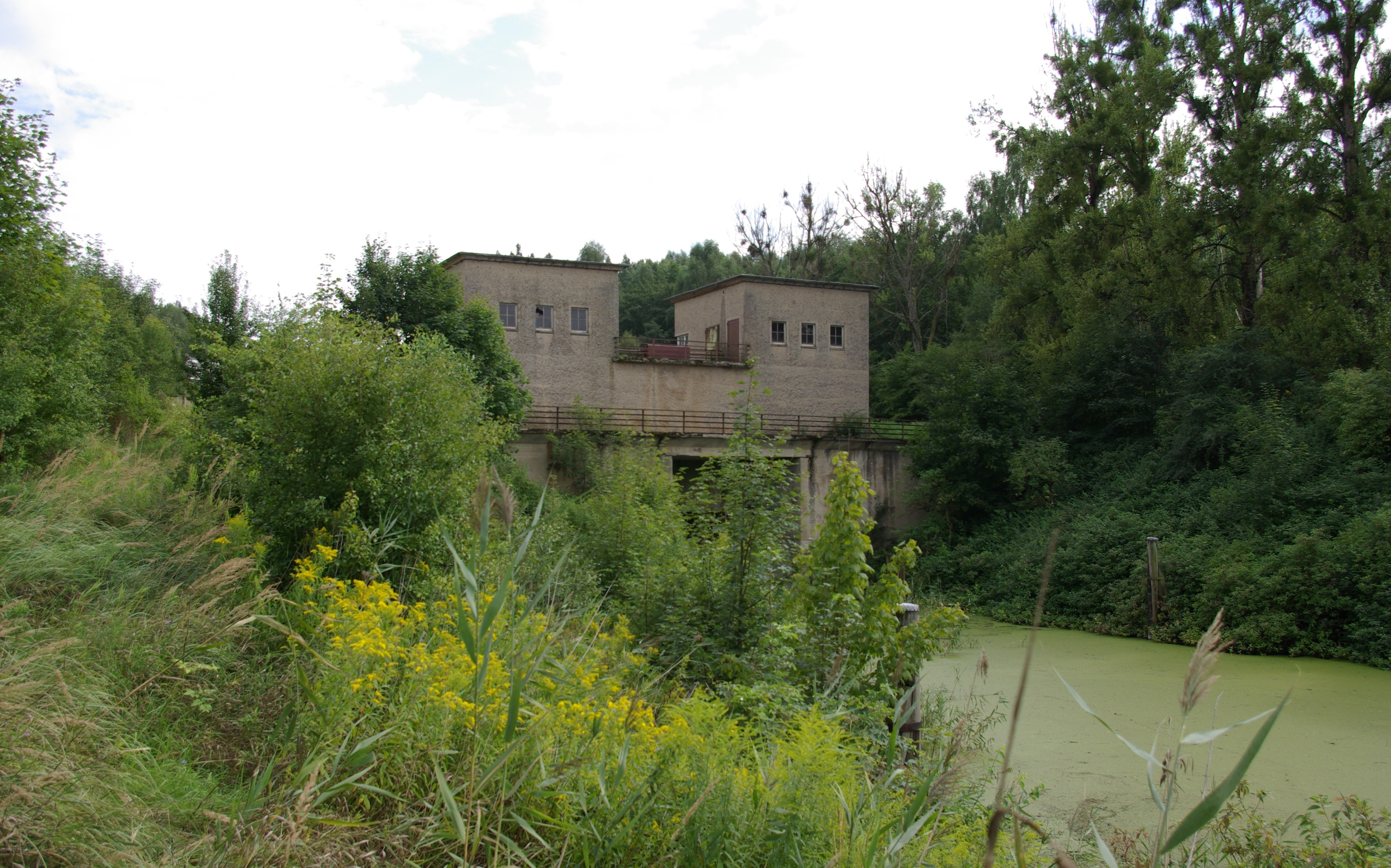 Kanał Mazurski, Śluza Piaski (Guja)